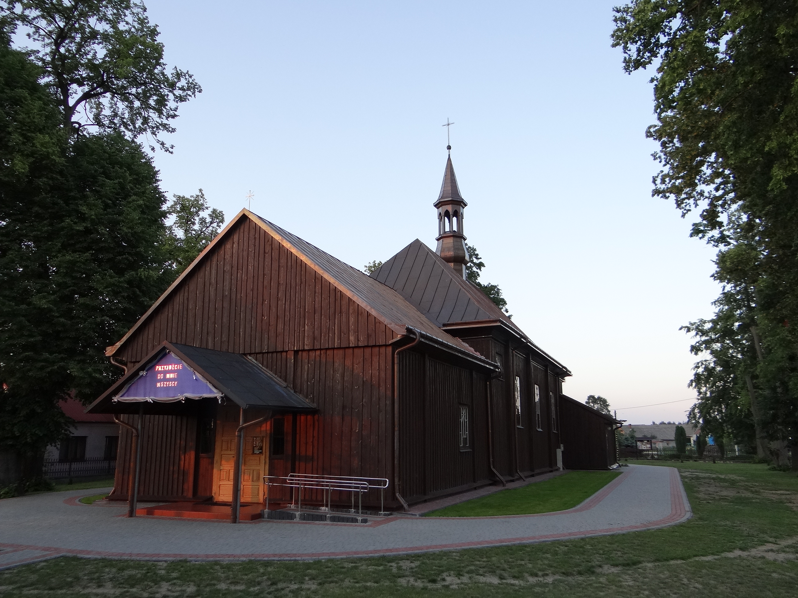 Zdjęcie wykonane w miejscowości Kurzyna Średnia, powiat niżański.